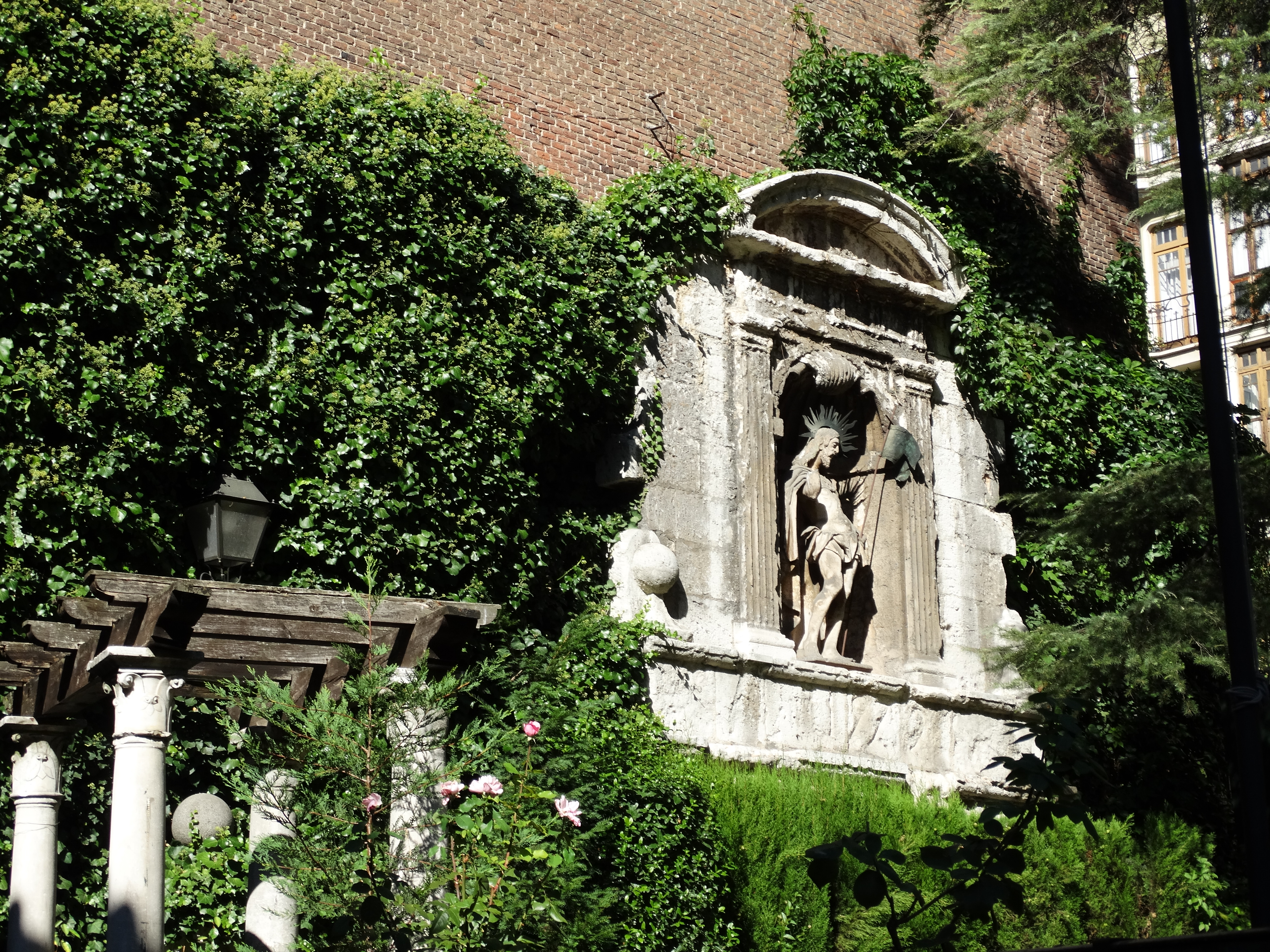 Portada del antiguo hospital de la Resurrección de la ciudad de Valladolid en España. Patrimonio desaparecido. Se pudo rescatar de la demolición y se encuentra en la jardín delantero de la casa de Cervantes y Real Academia de Bellas Artes.